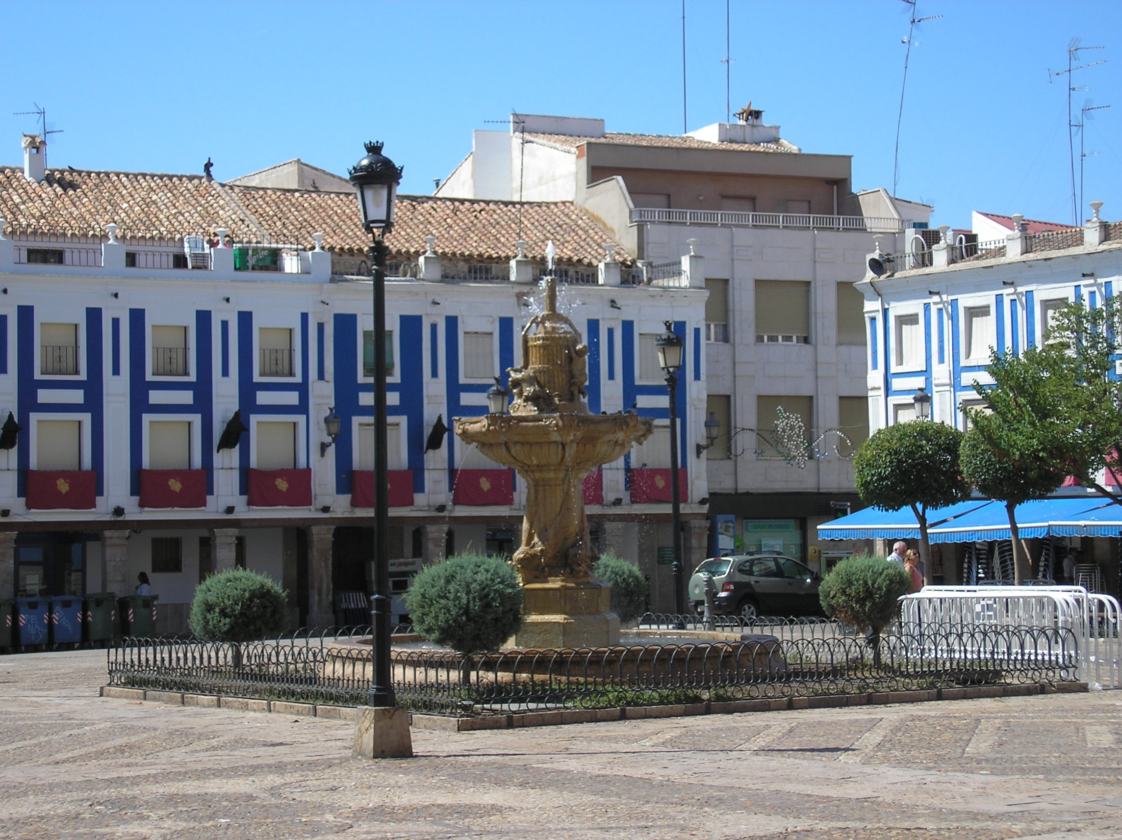 taken by valdoria 2006